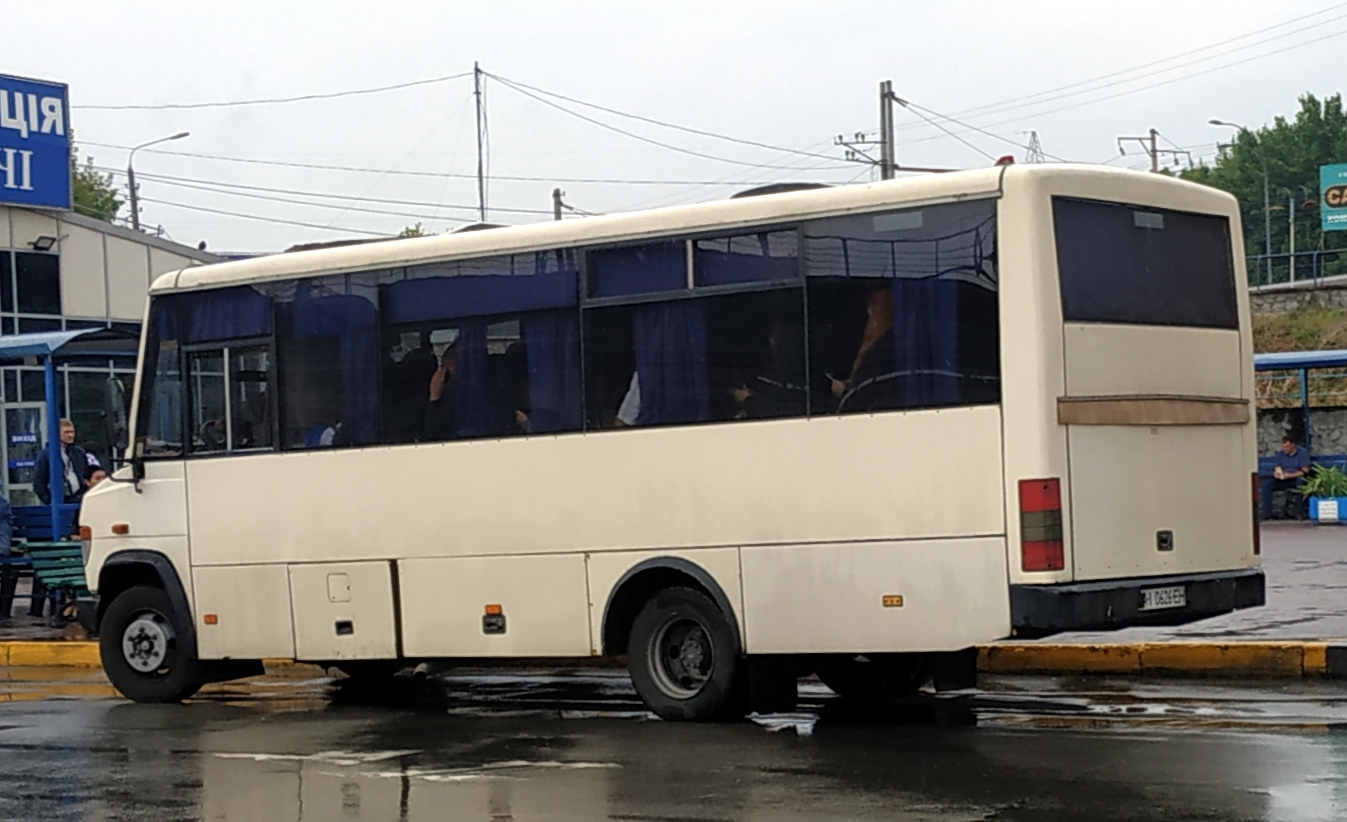 Автобус Стрый-Авто А-07562, Киев, автостанция Выдубичи, 2019 г.